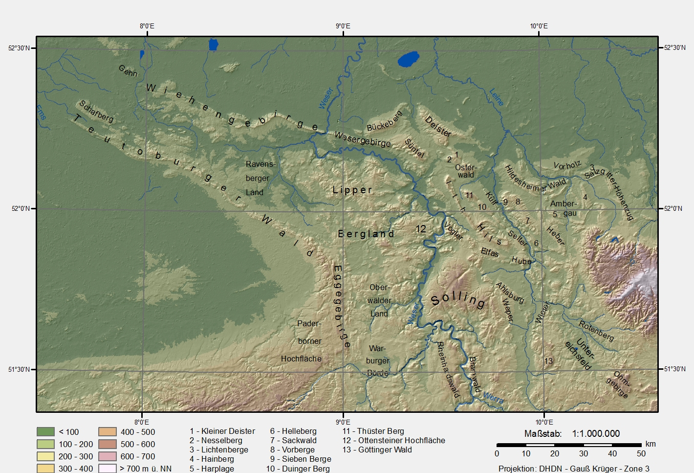 Karte des Niedersächsischen Berglandes (Lower Saxony mountain region). Datengrundlage: Geländehöhen aus dem digitalen Oberflächenmodell der »Shuttle Radar Topography Mission« (3"-Auflösung) Gewässer vom Geodatenserver Umwelt des Niedersächsischen Umweltministeriums (Achtung. Flüsse außerhalb Niedersachsens fehlen) Namen nach »Topographische Karte Deutschland« 1 : 1 000 000 - Ausgabe Landschaften Projektion/Koordinaten: Gauß Krüger Zone 3 Deutsches Hauptdreiecksnetz Transversal Mercator Bessel 1841